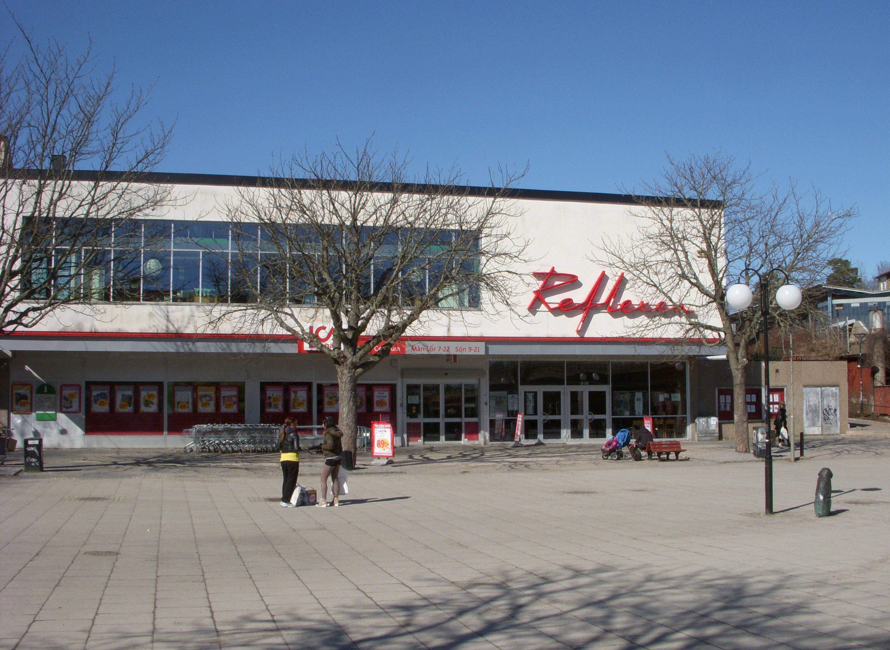 Biograf Reflexen på Kärrtorpsplan